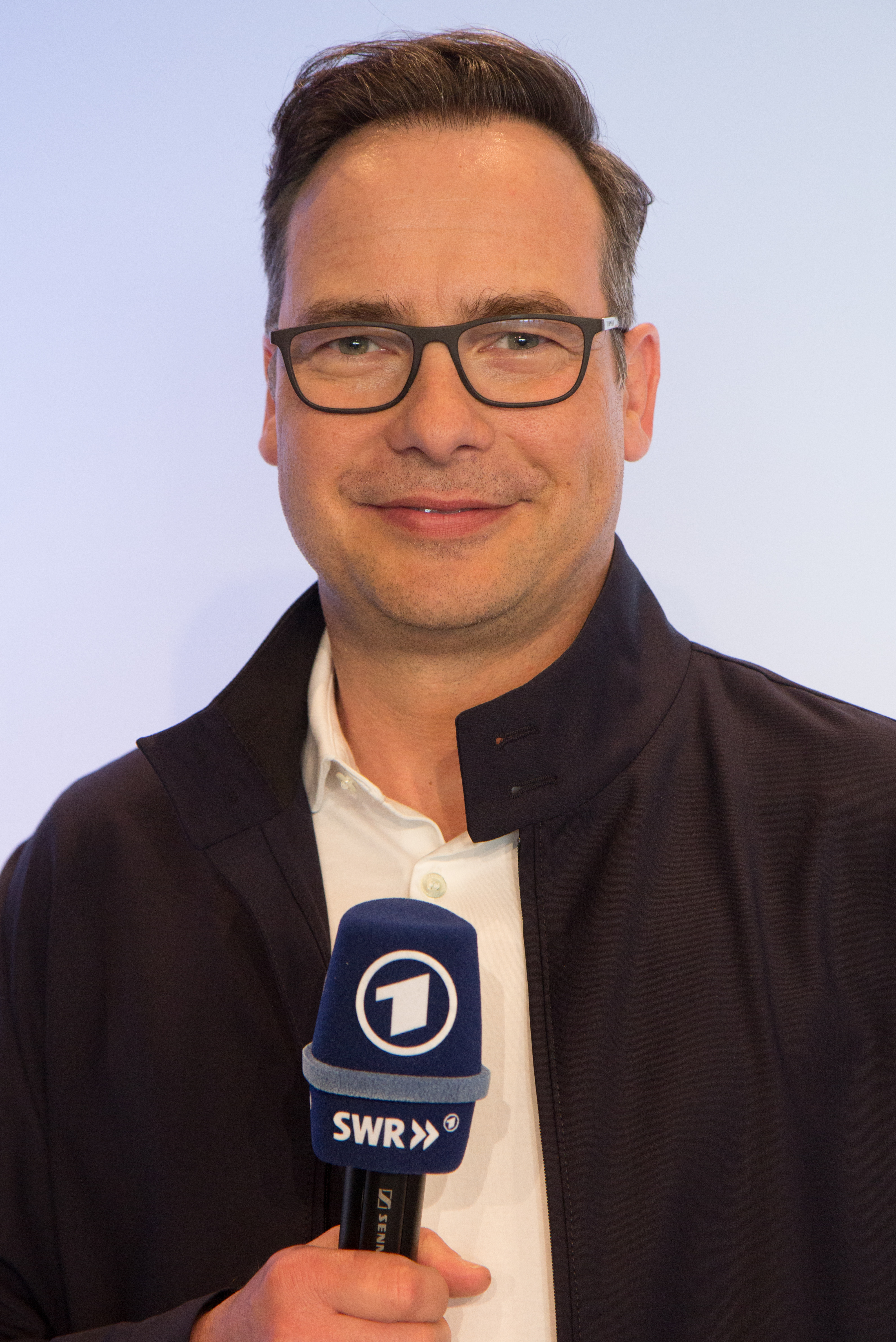 FIFA WM 2018 Pressevorstellung von ARD und ZDF in Hamburg: Matthias Opdenhövel